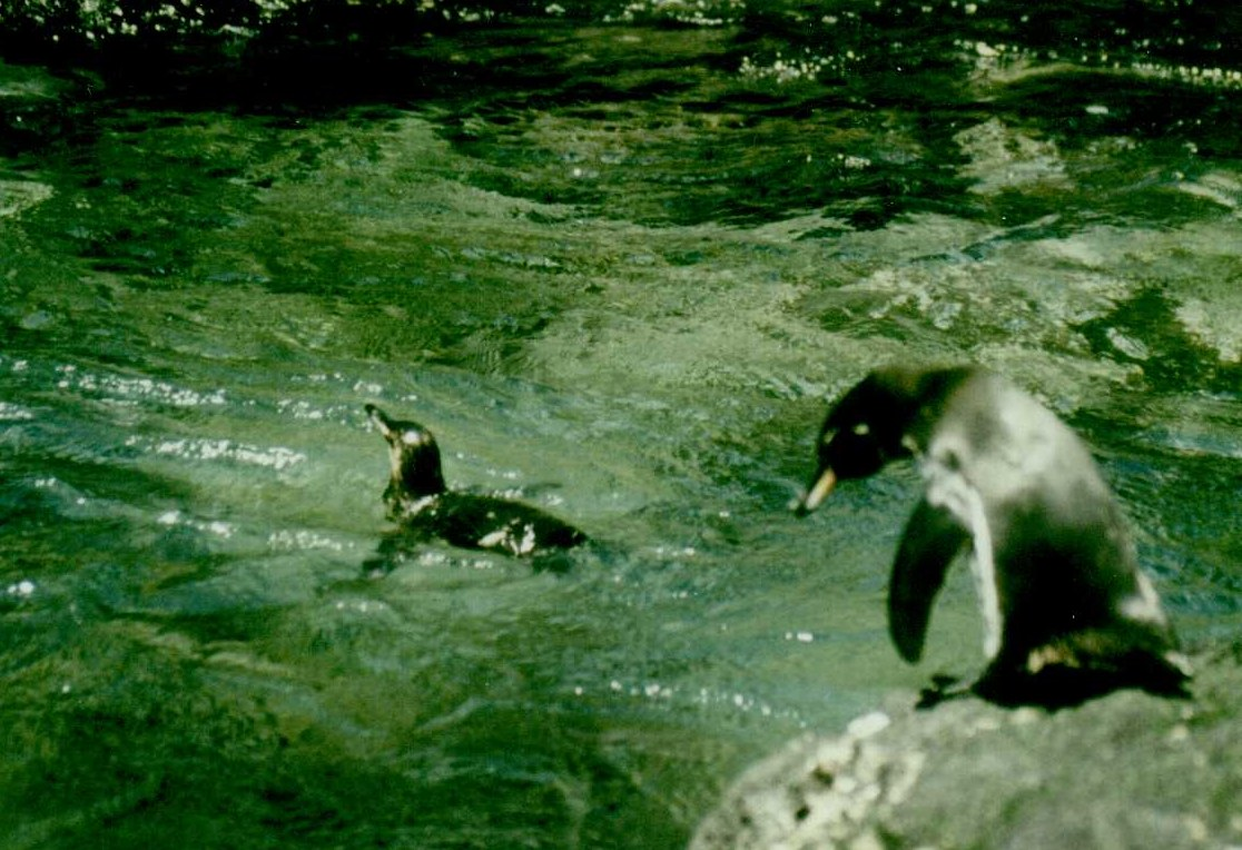 Spheniscus Mendiculus. Pingüino de las Islas Galápagos.